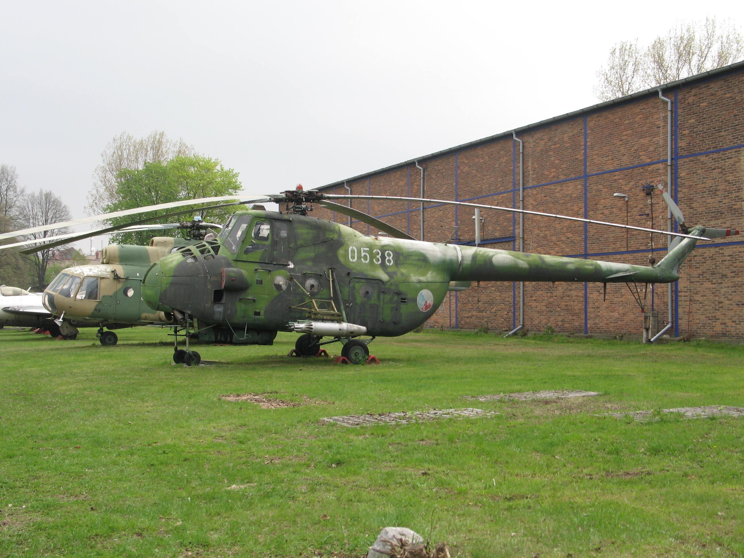 Mi-4 at museum, Prague